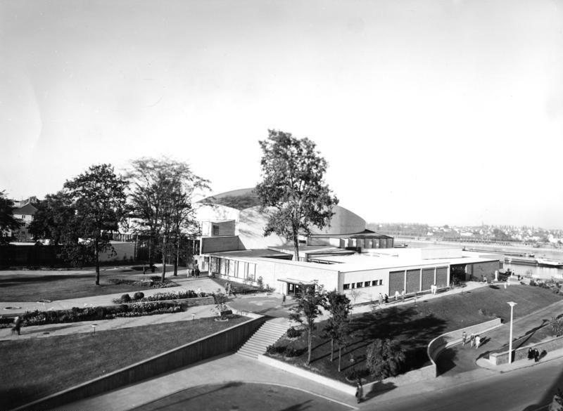 Bonn, Beethovenhalle von der Theaterstraße aus gesehen